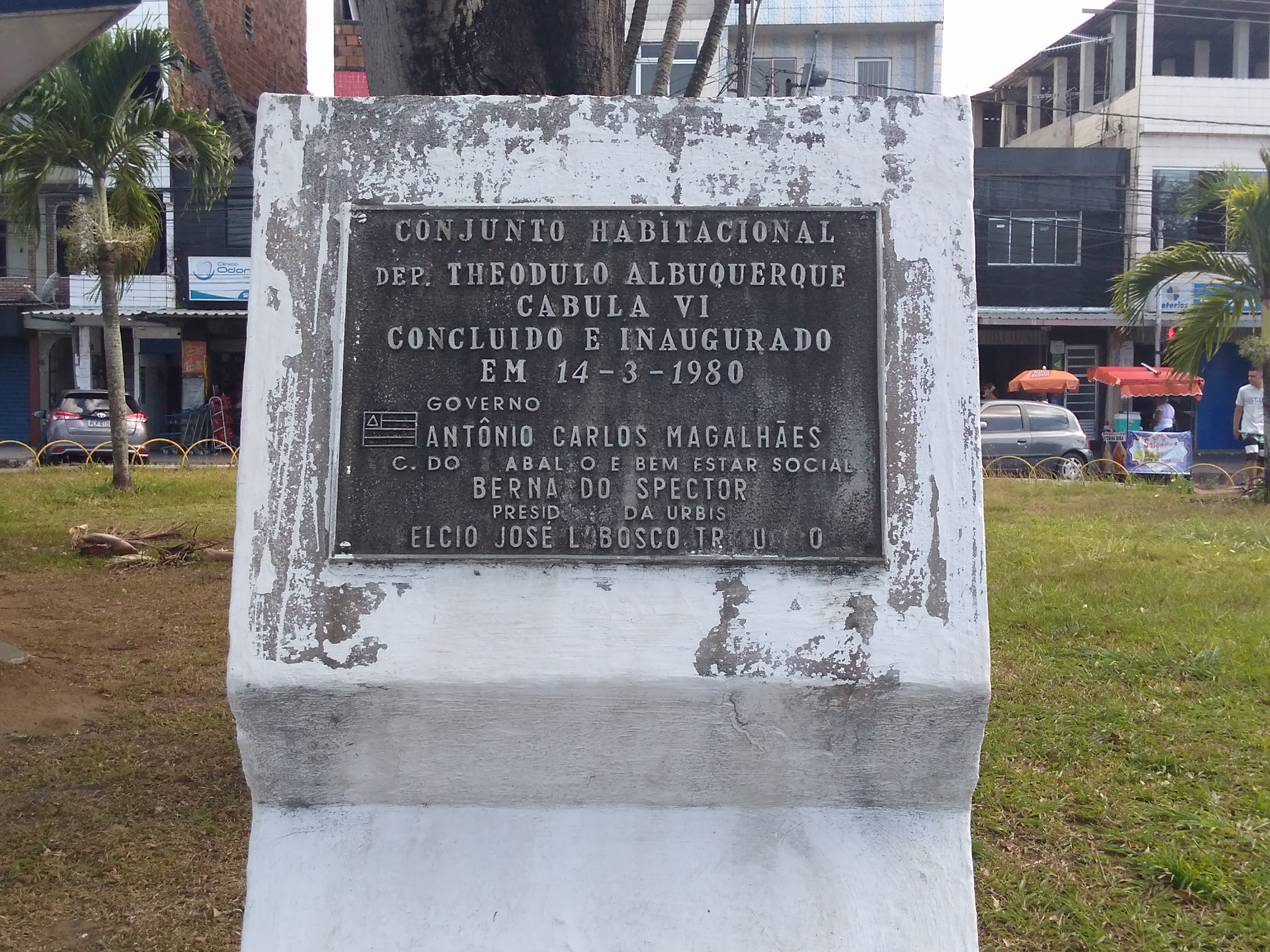 Placa de inauguração do Conjunto Habitacional Deputado Téodulo de Albuquerque, conhecido Como Cabula VI, de Salvador - BA